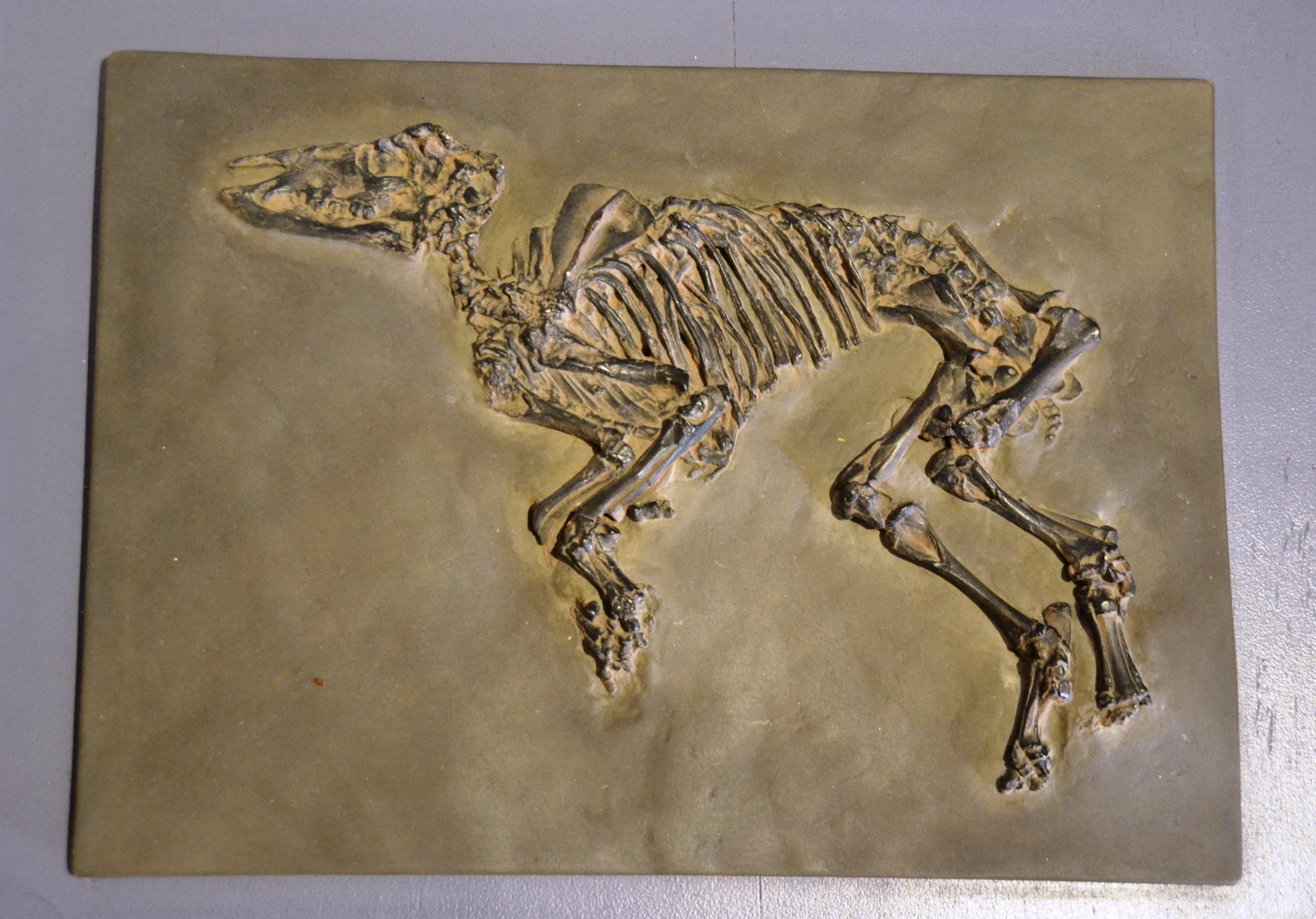 Skelett eines Zwergpferdes im Naturkundemuseum Ostbayern in Regensburg.